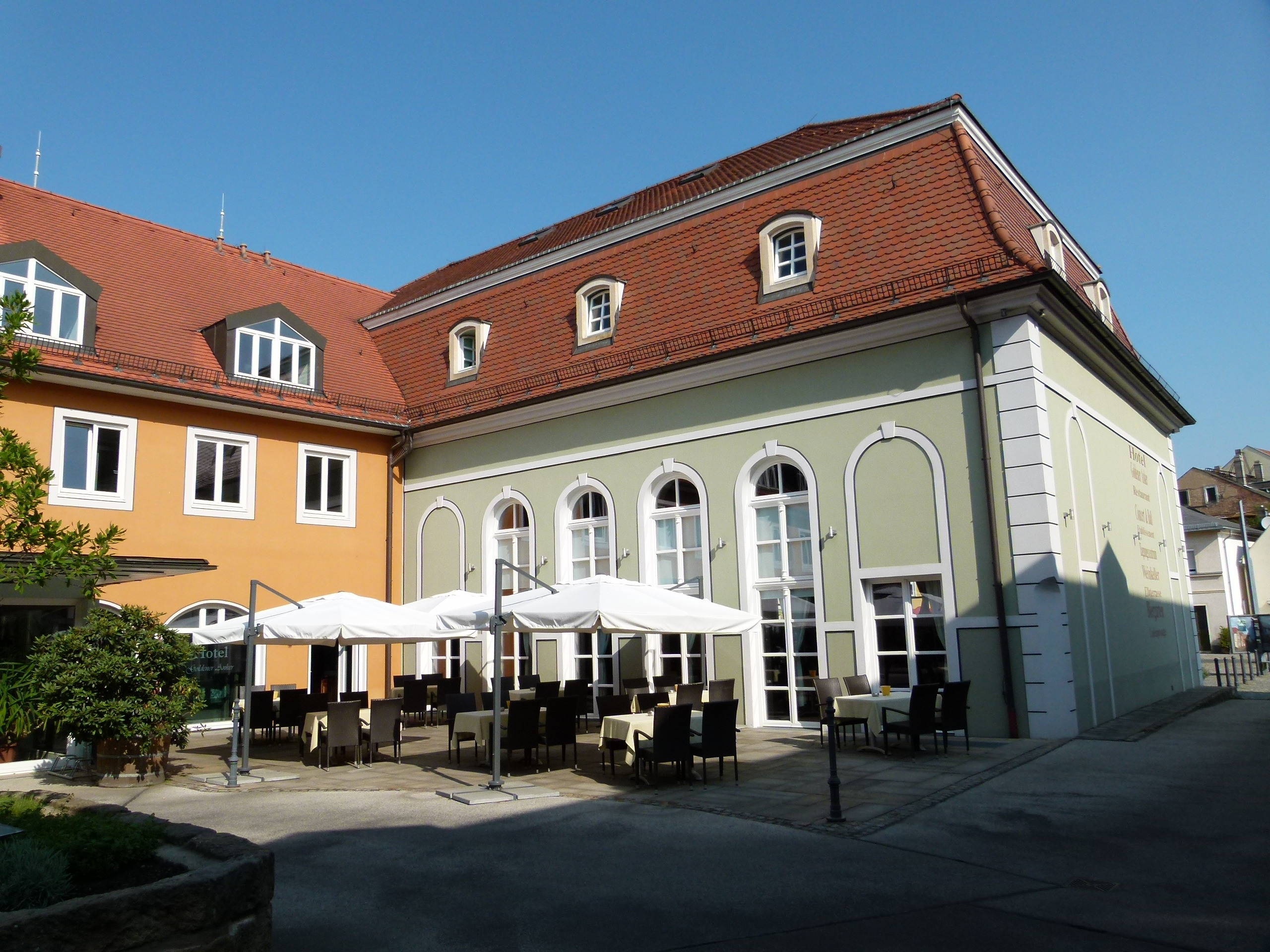 Denkmalgeschütztes Haus, Altkötzschenbroda 61, Radebeul, Sachsen